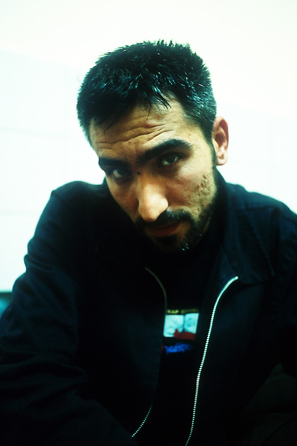 Sagopa Kajmer